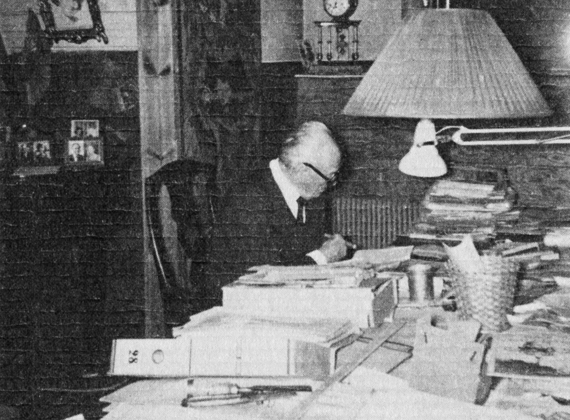 Sigurd Lewerwntz i sin lägenhet på fabriken i Eskilstuna